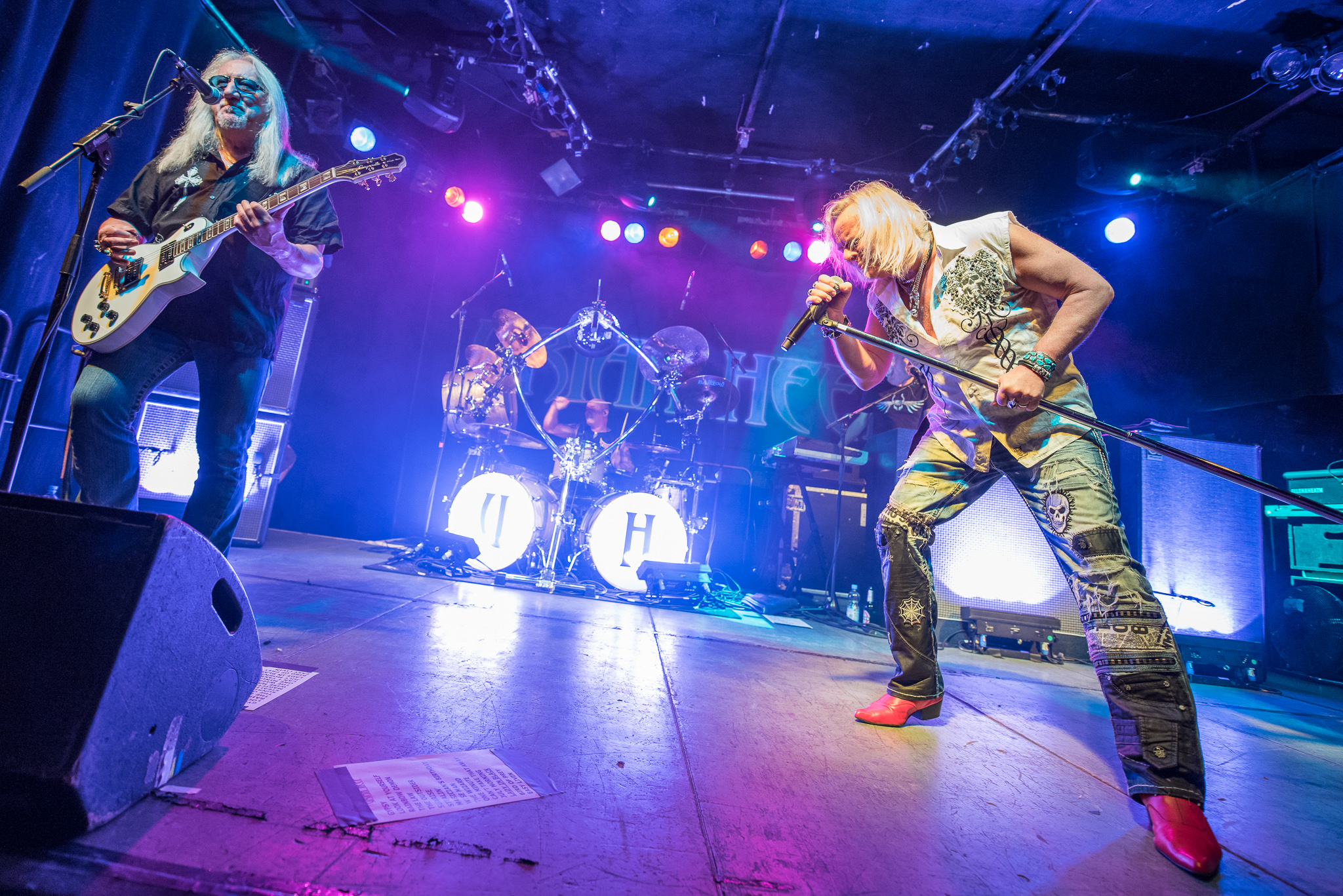 Bernie Shaw,Concertbüro Franken,Der Hirsch,Konzert,Livekonzert,Livemusik,Mick Box,Musik,Russell Gilbrook,Uriah Heep